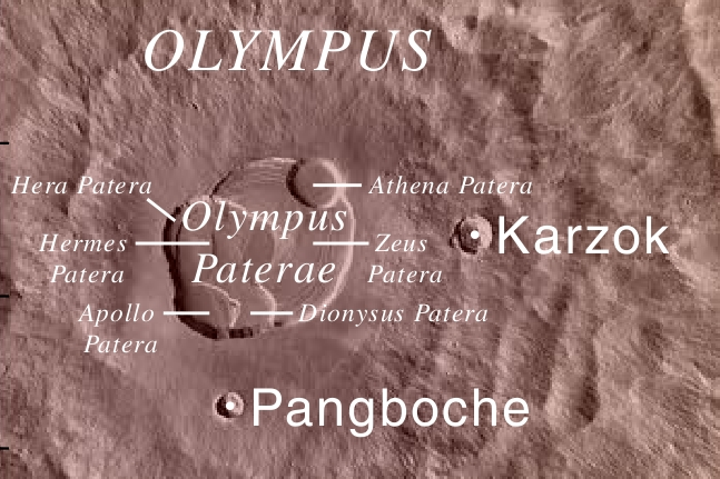 Olympus Paterae; Apollo Patera, Athena Patera, Dionysus Patera, Hera Patera, Hermes Patera, Zeus Patera.